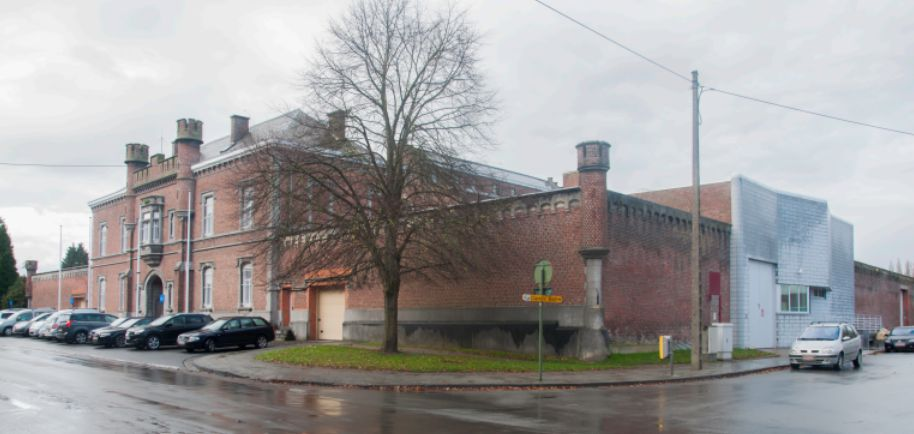 Elverdingestraat 72 8900 Ieper (Belgie) Bouwjaar: 1875 Type gevangenis: gesloten inrichting Directeur: De Vidts Christiaan Boudin Machteld